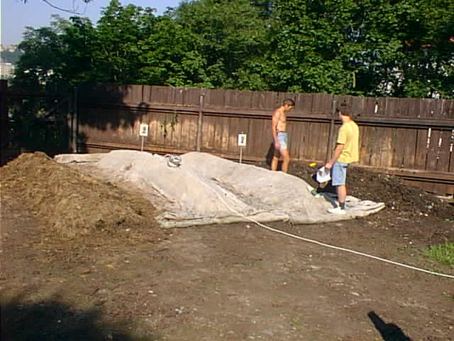 Malá kompostárna - kompostoviště v Praze na Vyšehradu; zdroj: Biom.cz, autor: Antonín Slejška